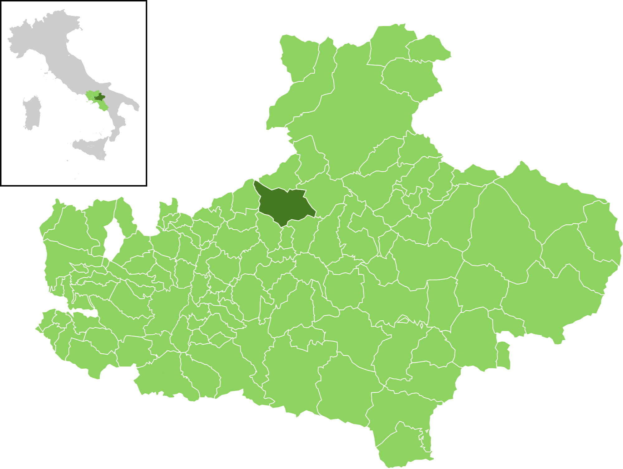 Posizione del comune all'interno della provincia di Avellino